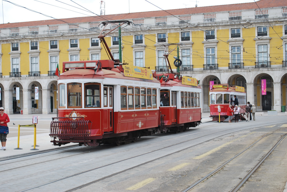 Tram in Lisbon